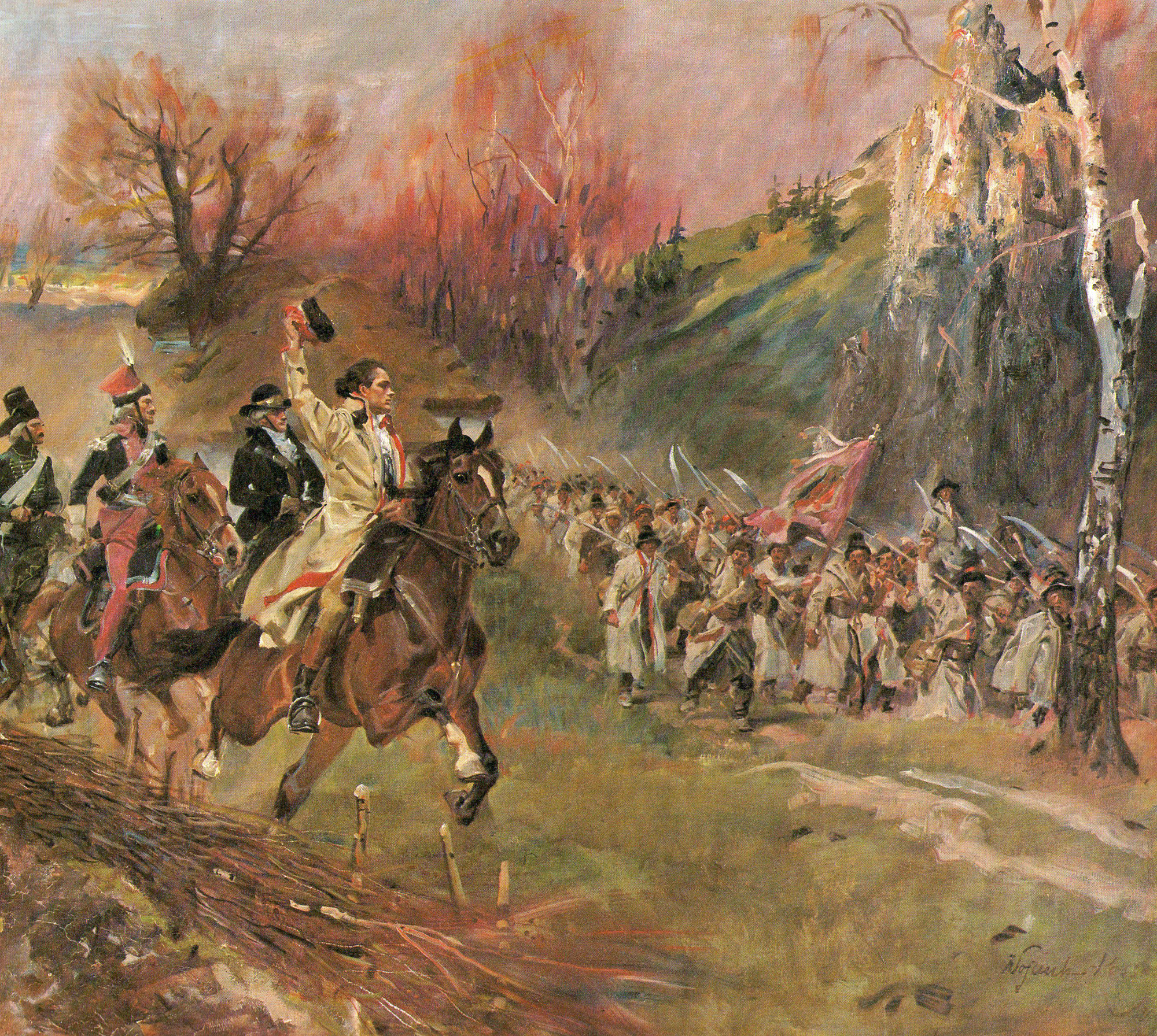 Kościuszko z kosynierami